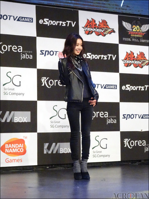 가수 남규리